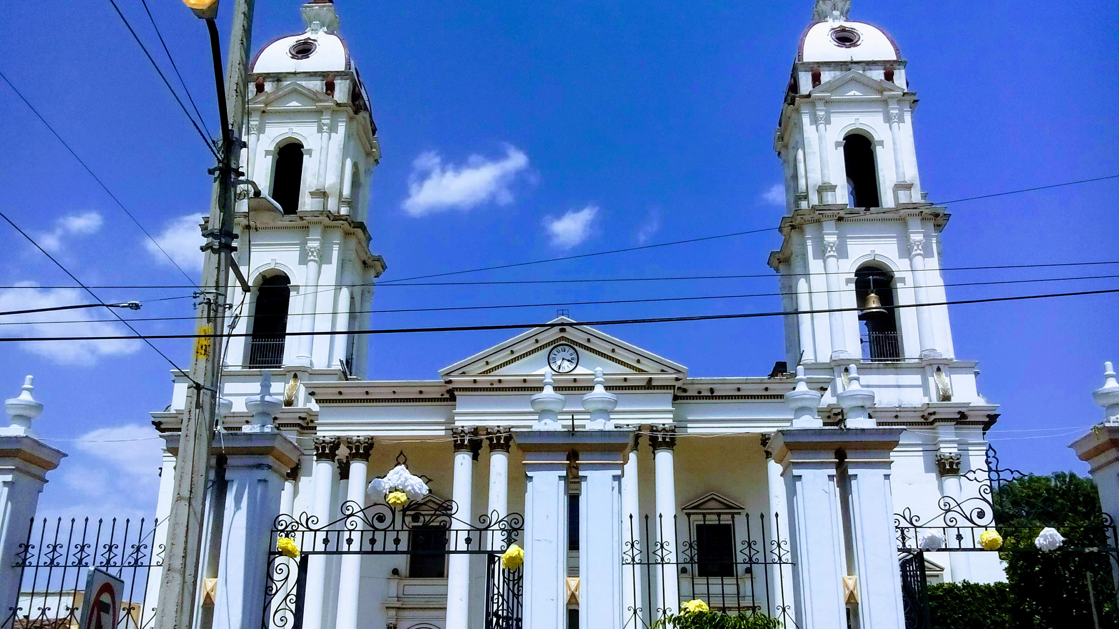 Se encuentra en el centro del pueblo de Tlajomulco de Zúñiga, tien una gran altura y extensión. Es mayormente blanco y dorado y tiene un diseño neoclásico.